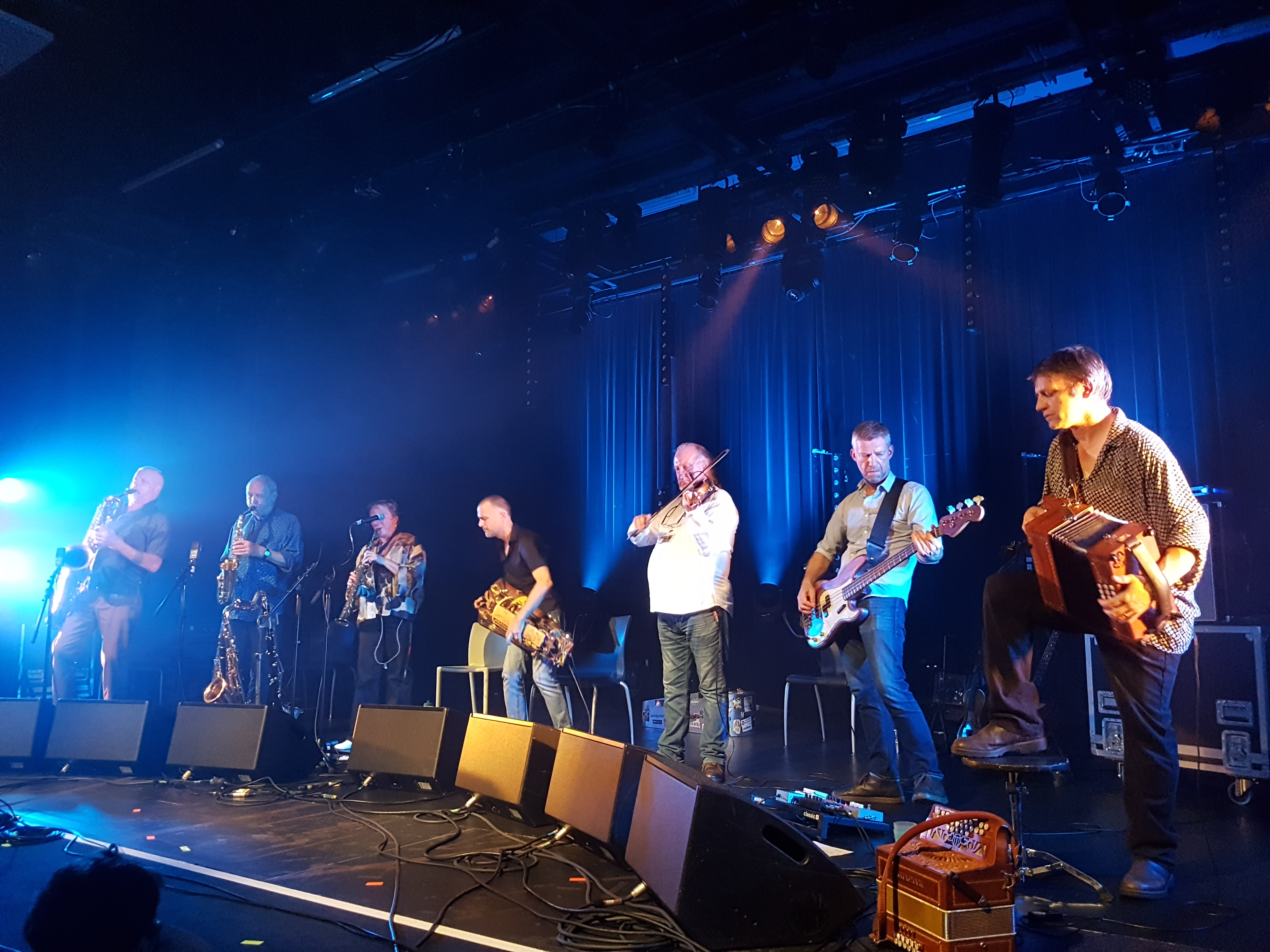 Blowzabella à Folkiri 2018, Le Mans